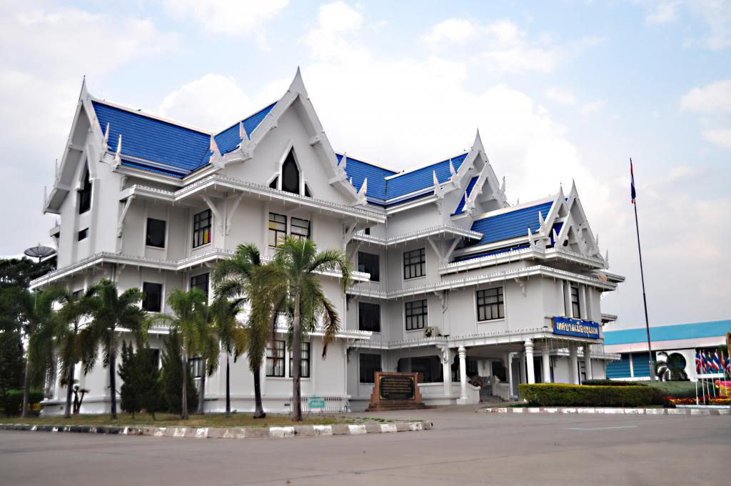 สำนักงานเทศบาลเมืองชุมแพ